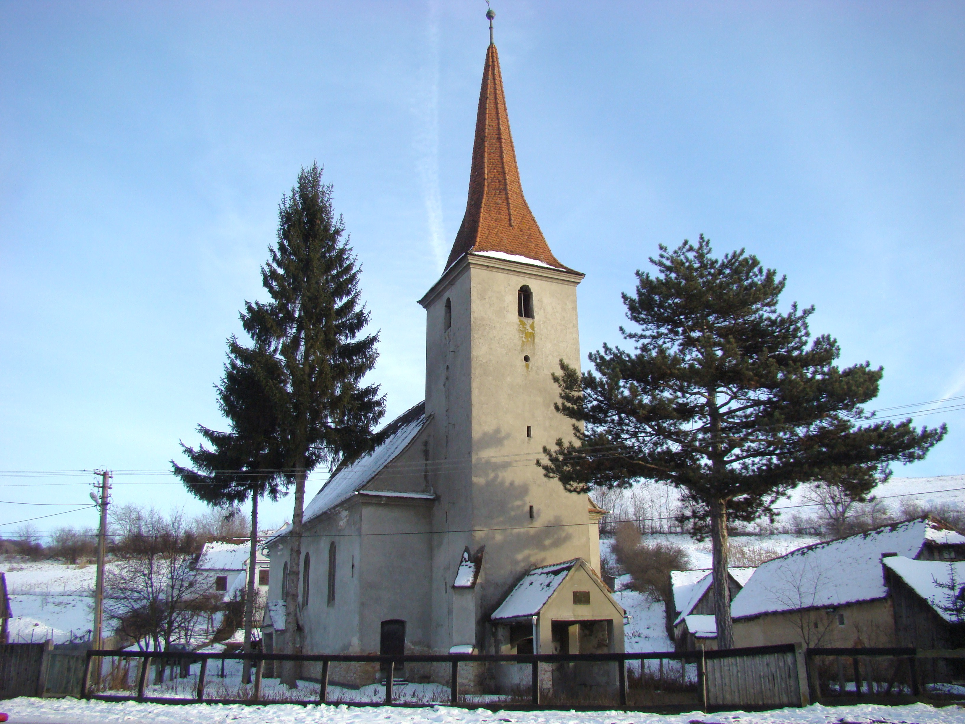 Biserica evanghelică din Viișoara (fostul sat Domald)